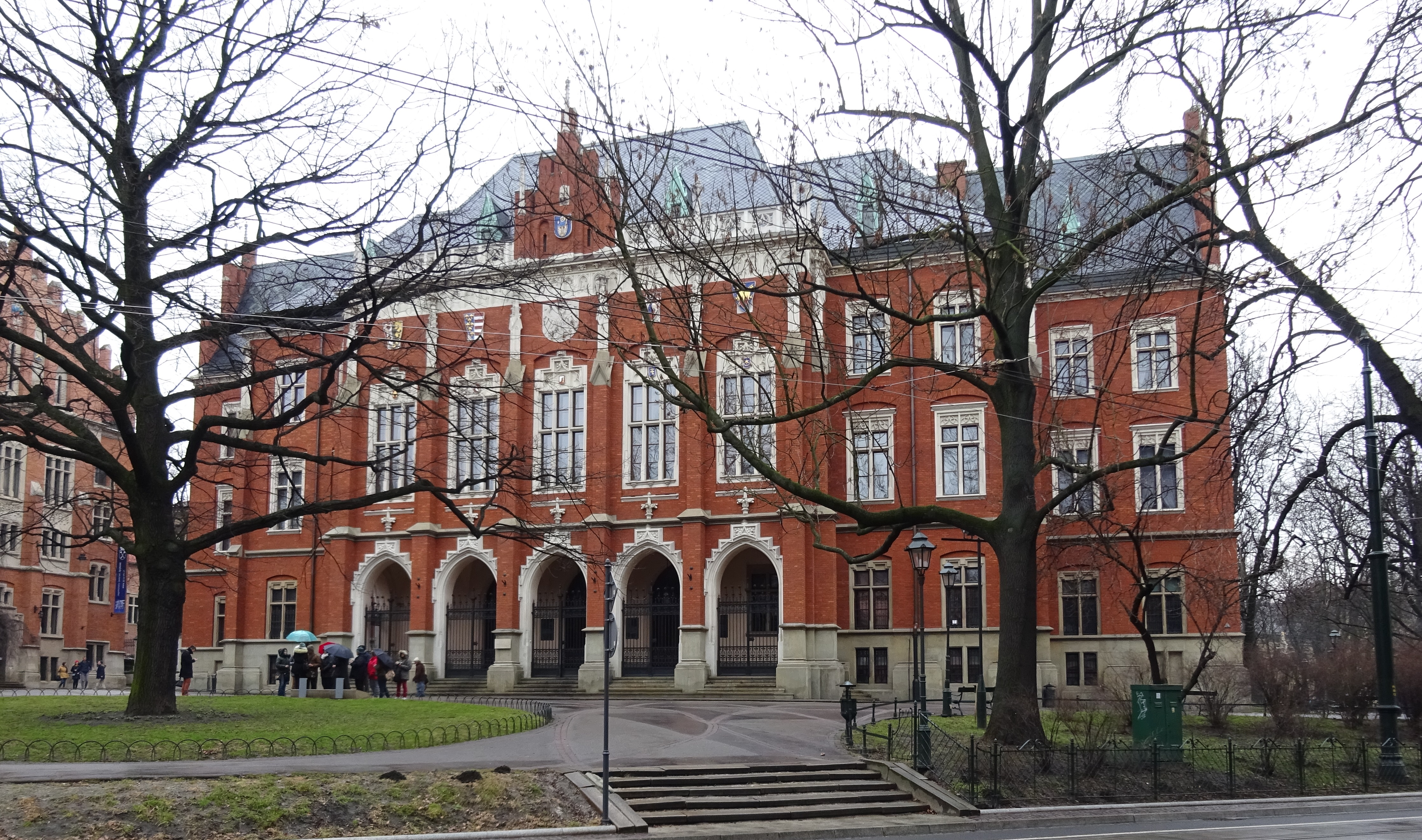 Collegium Novum Uniwersytetu Jagiellońskiego. Widok z zachodu. Po remoncie, 2016.